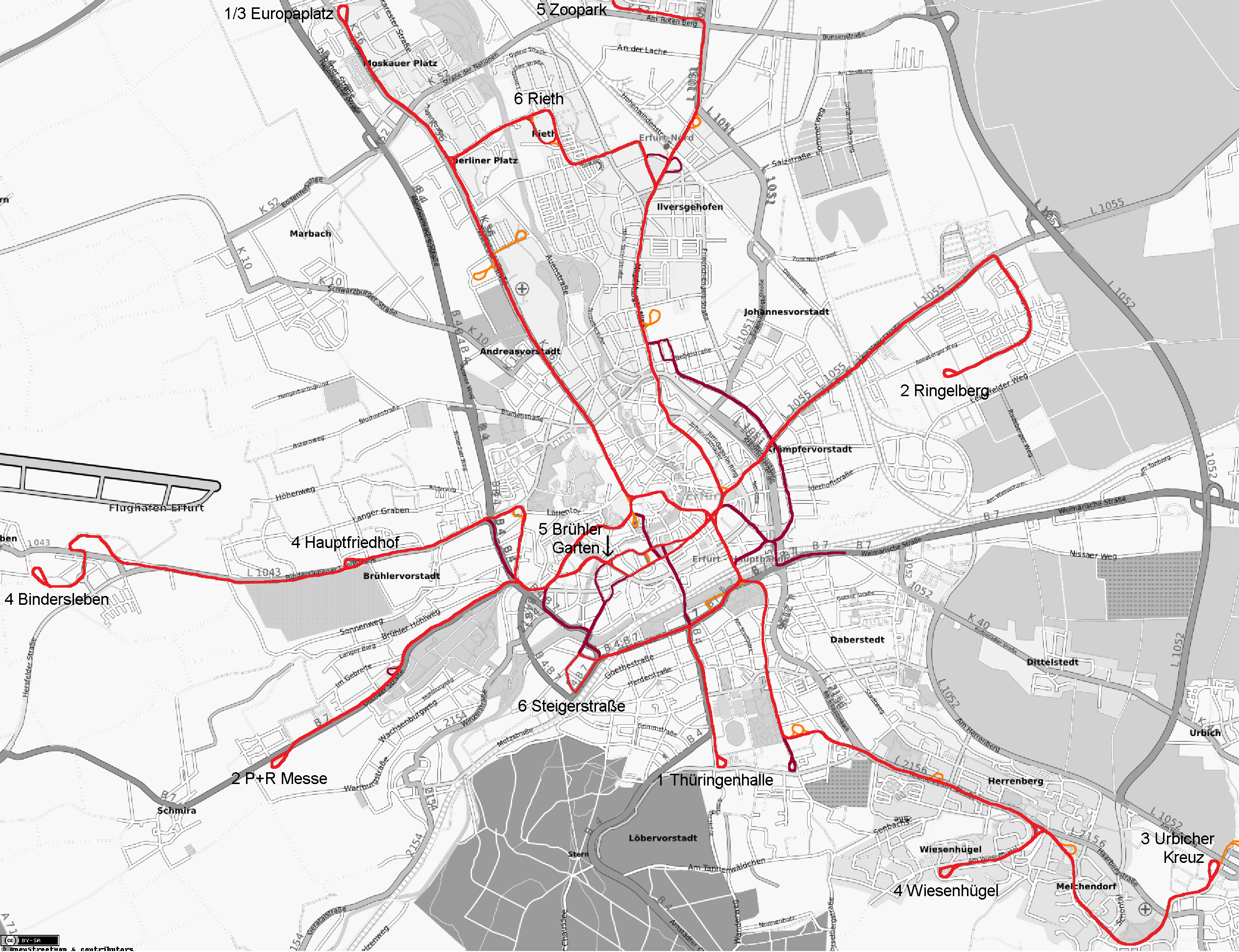 Der Plan zeigt das Erfurter Stadtbahnnetz mit Strecken im Linienverkehr (rot), Betriebsstrecken (orange) und stillgelegten Strecken (dunkelrot).